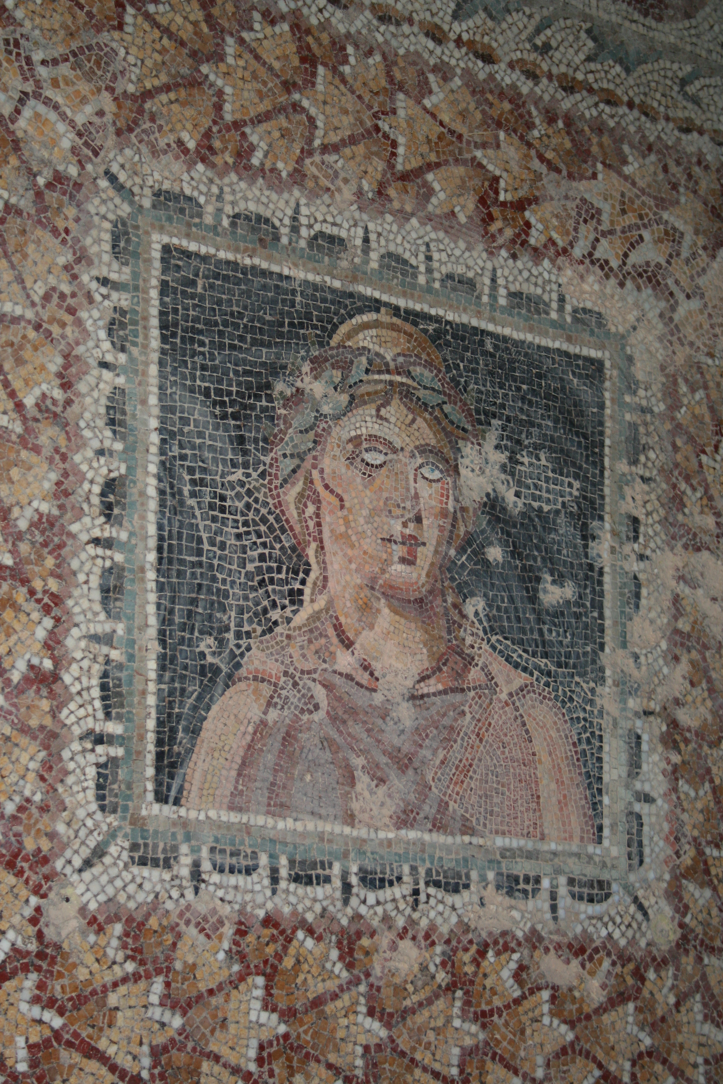 mosaique du sous-sol de la maison dite d'Amphitrite, Bulla Regia